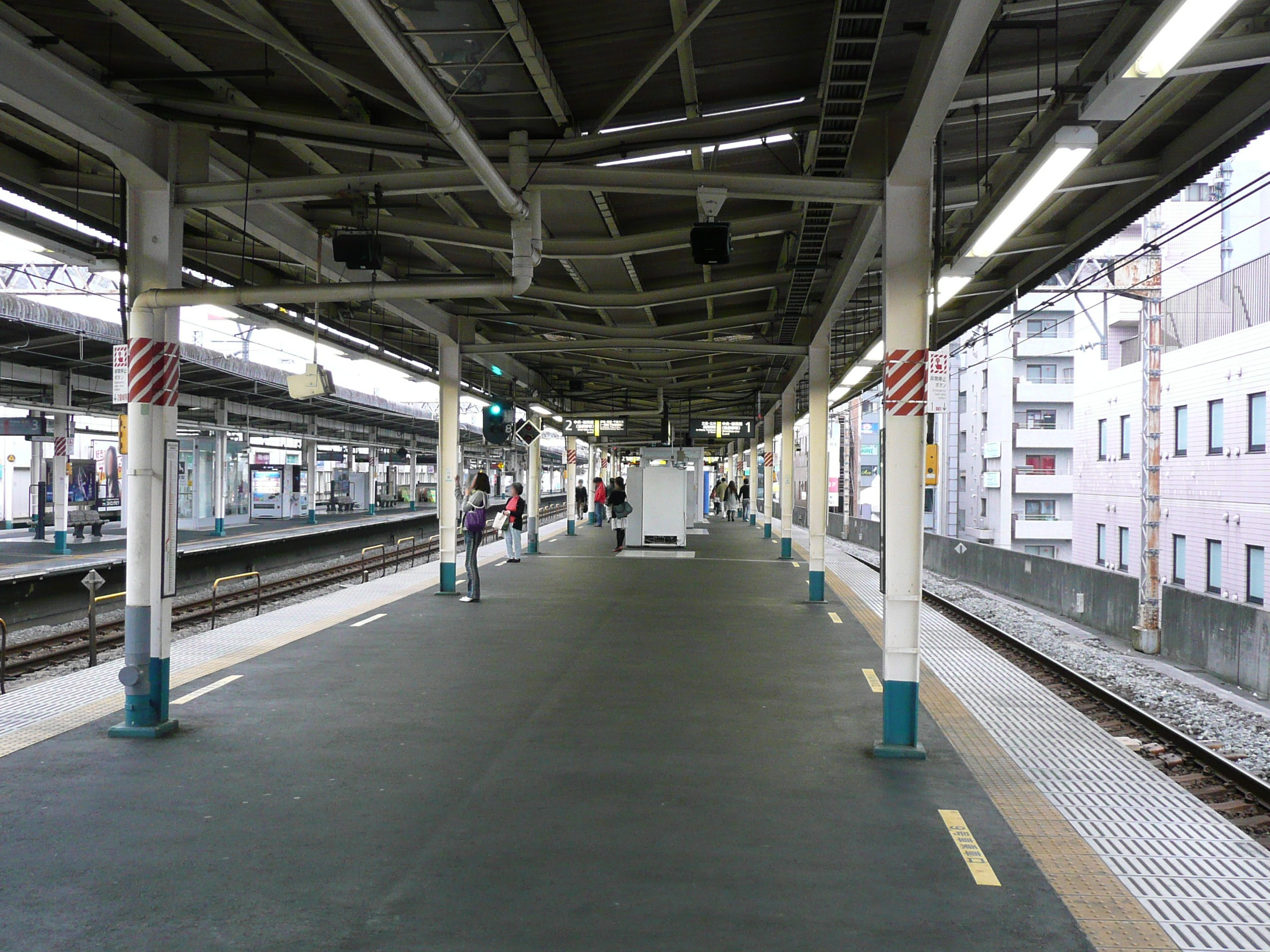 阿佐ヶ谷駅1･2番ホーム